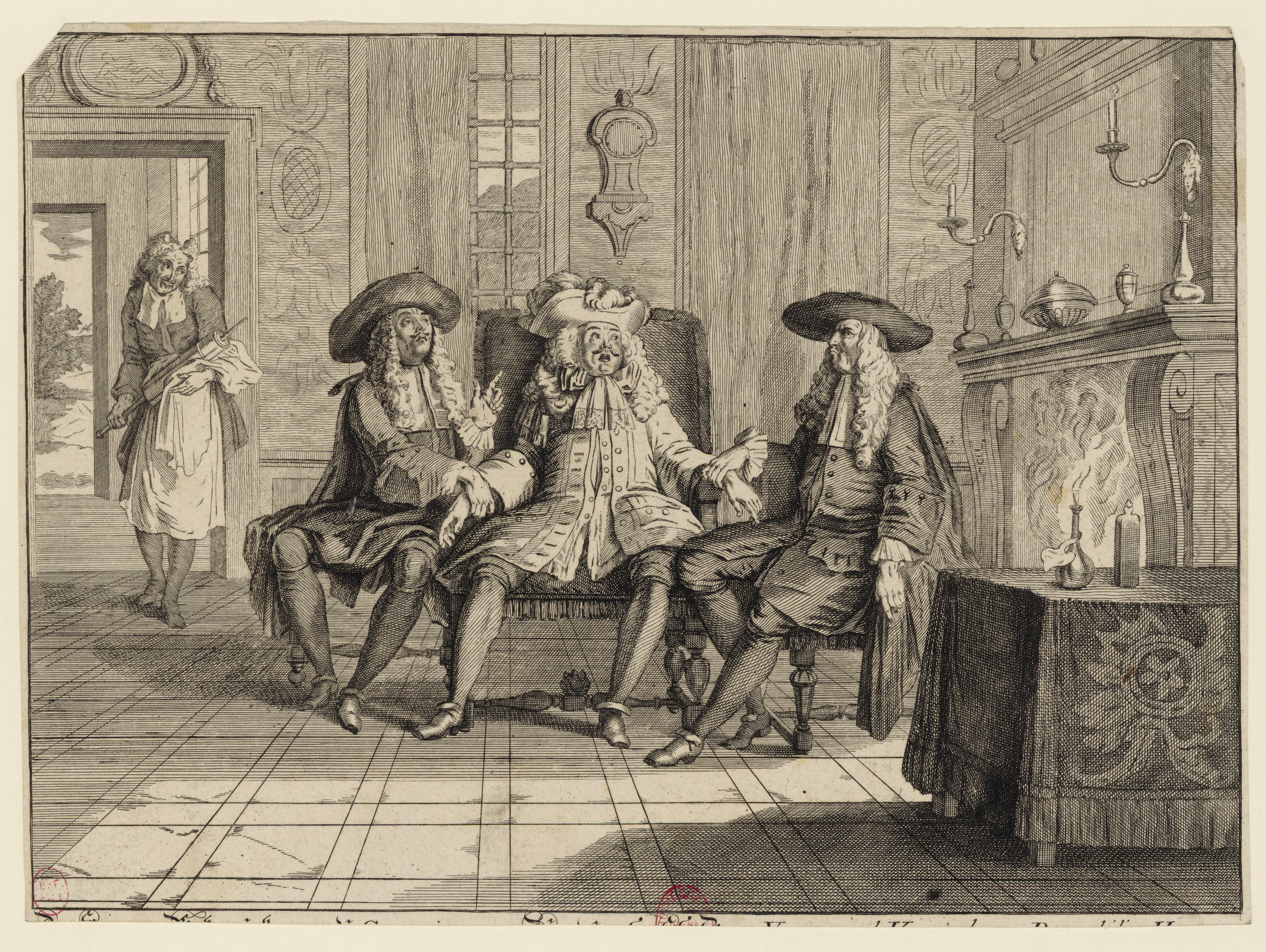 Molière (1622-1673). Le malade imaginaire